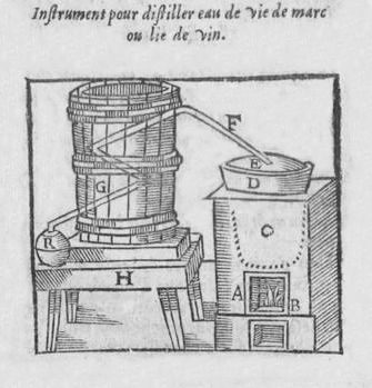 Appareil à distiller l'eau-de-vie avec système de refroidissement par serpentin dans un bac d'eau froide, d'après Jean Liébault (1535-1596)